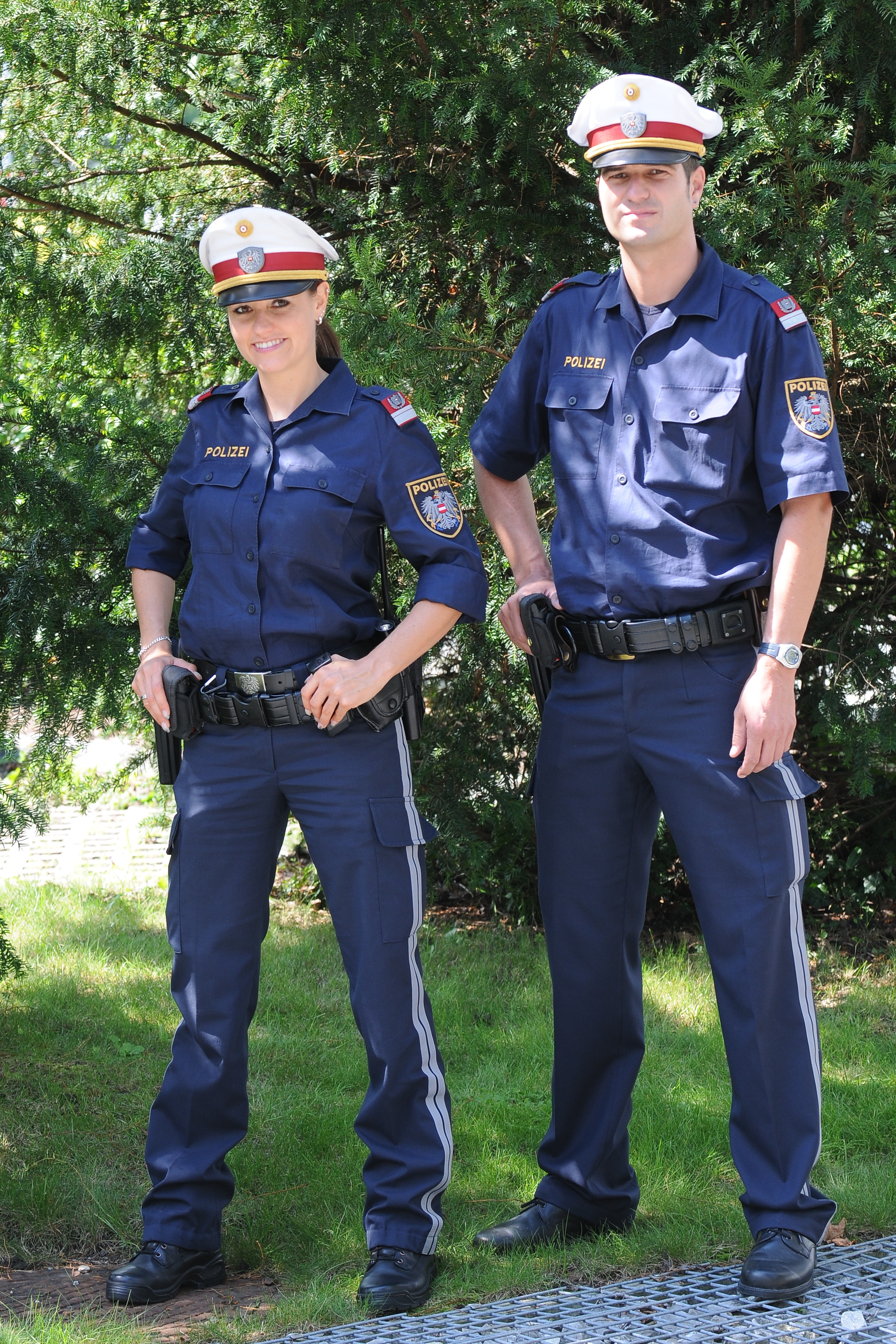 Zwei Beamte der österreichischen Bundespolizei in Dienstuniform.